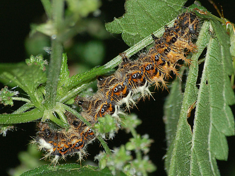 Polygonia c-album (Larva)